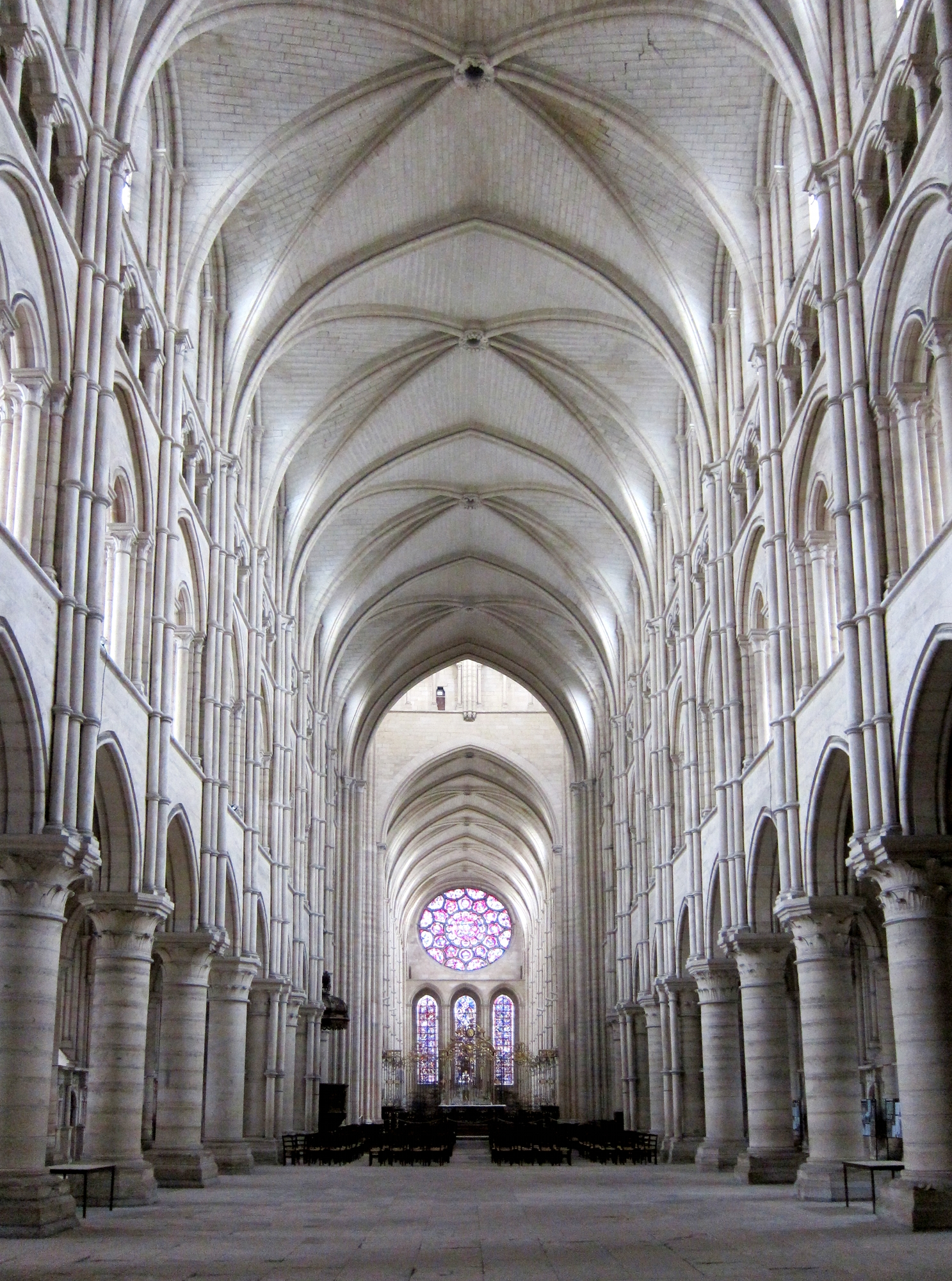 La nef de la cathédrale Notre-Dame de Laon (Aisne).